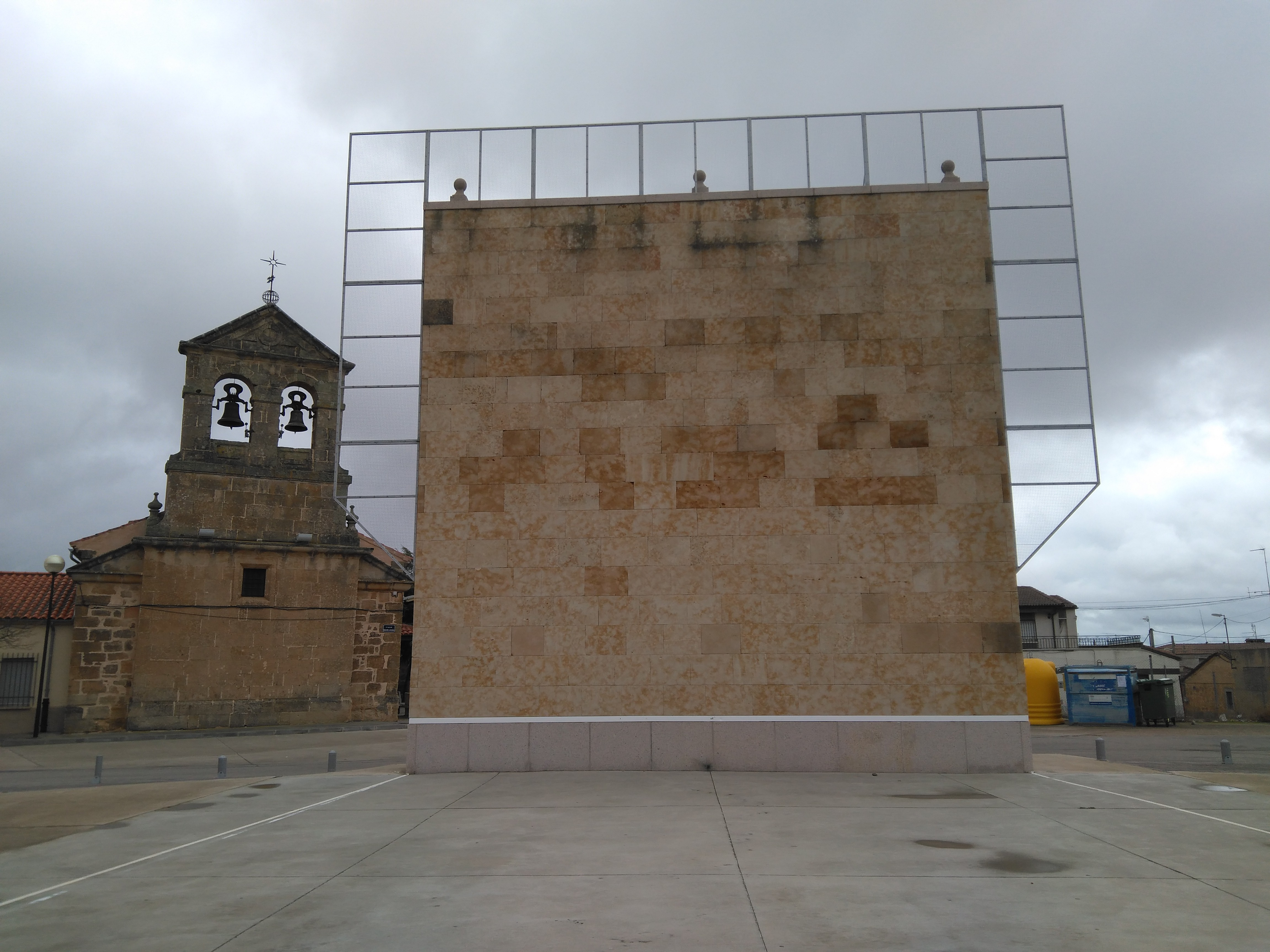 Frontón de Barbadillo, de carácter tradicional e histórico.